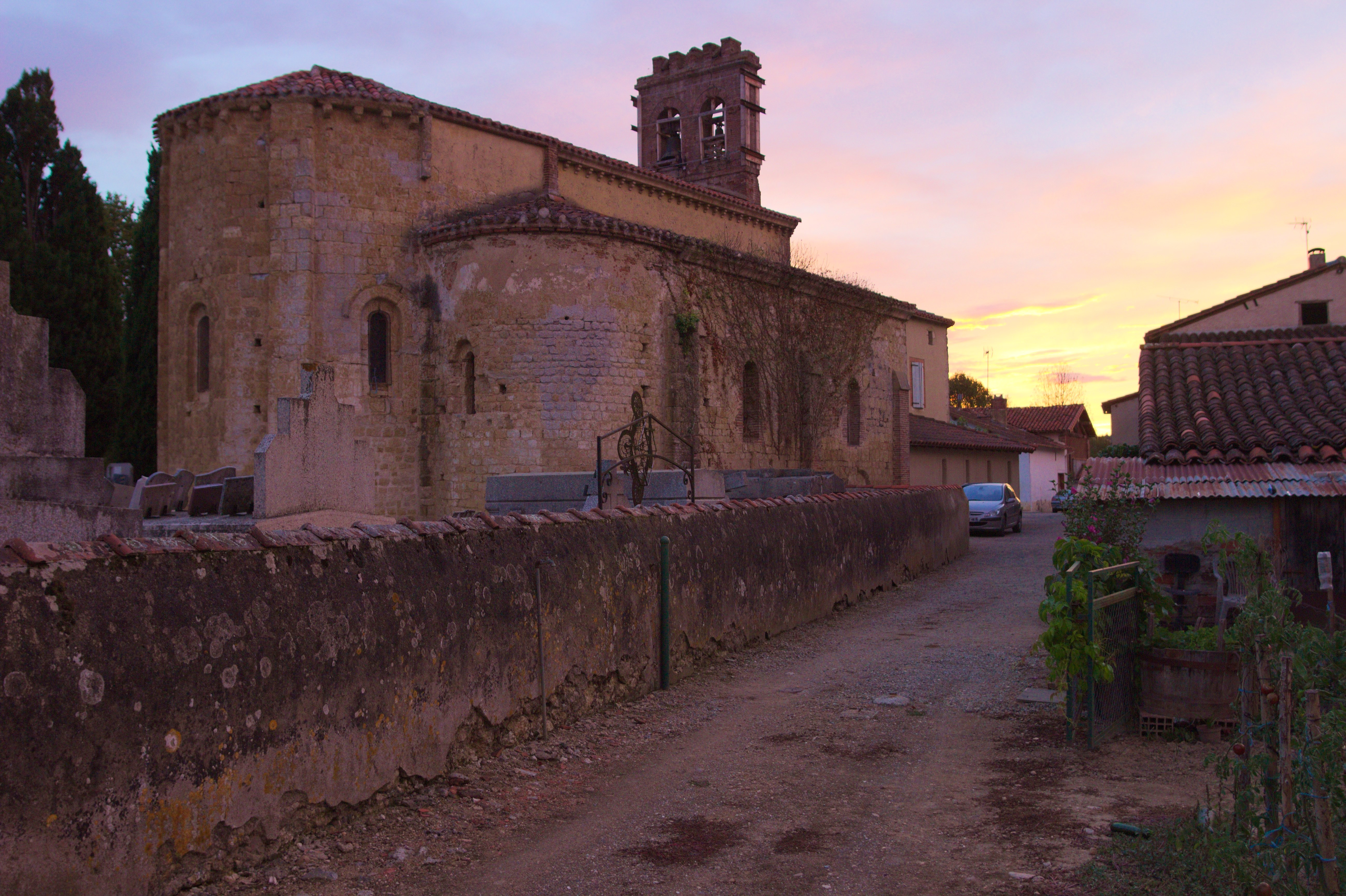 Église Saint-Martin de Villeneuve-du-Latou